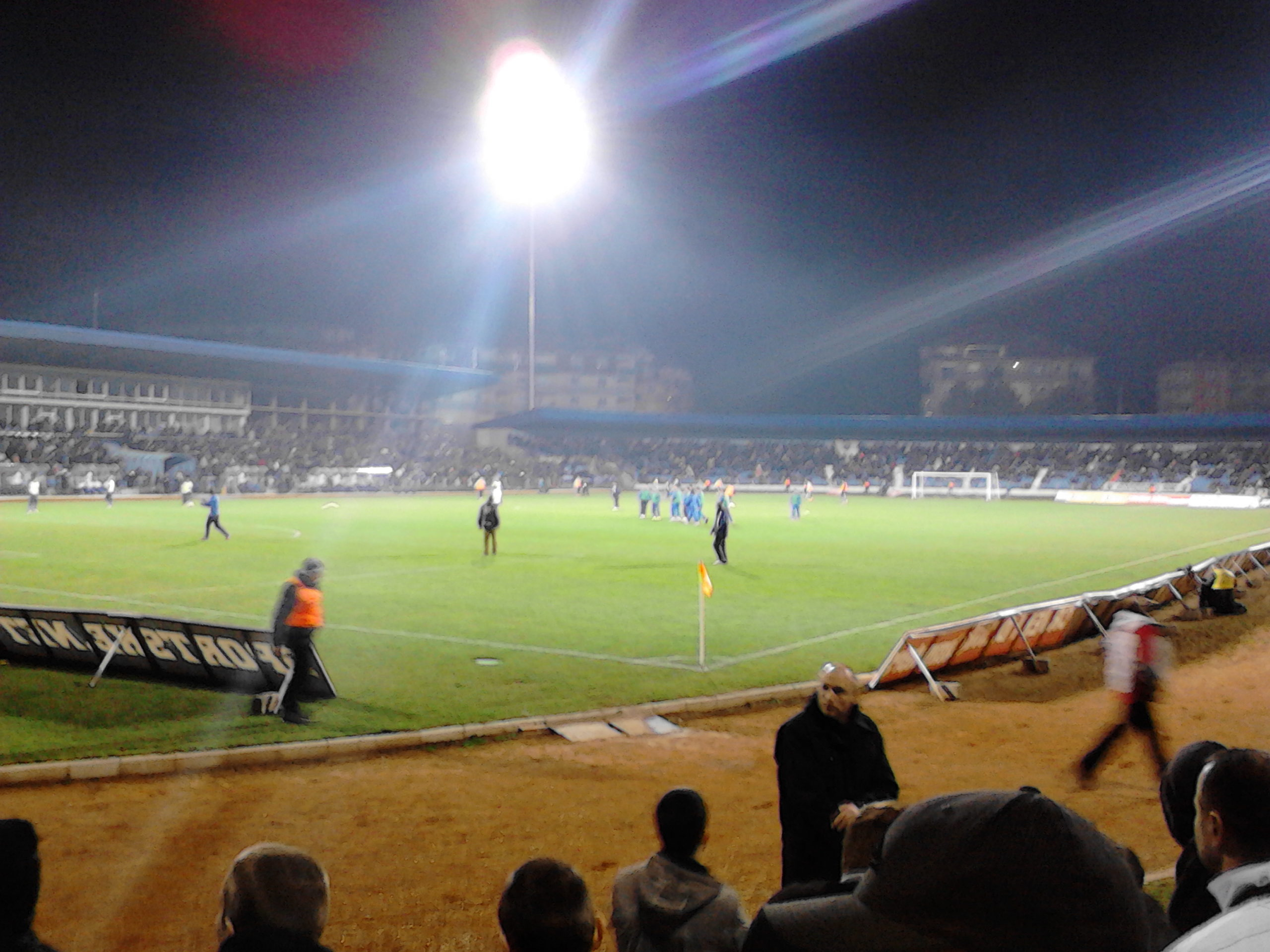 Srpski (latinica): Zapadna i severna tribina stadiona u Jagodini na utakmici FK Jagodina - FK Partizan